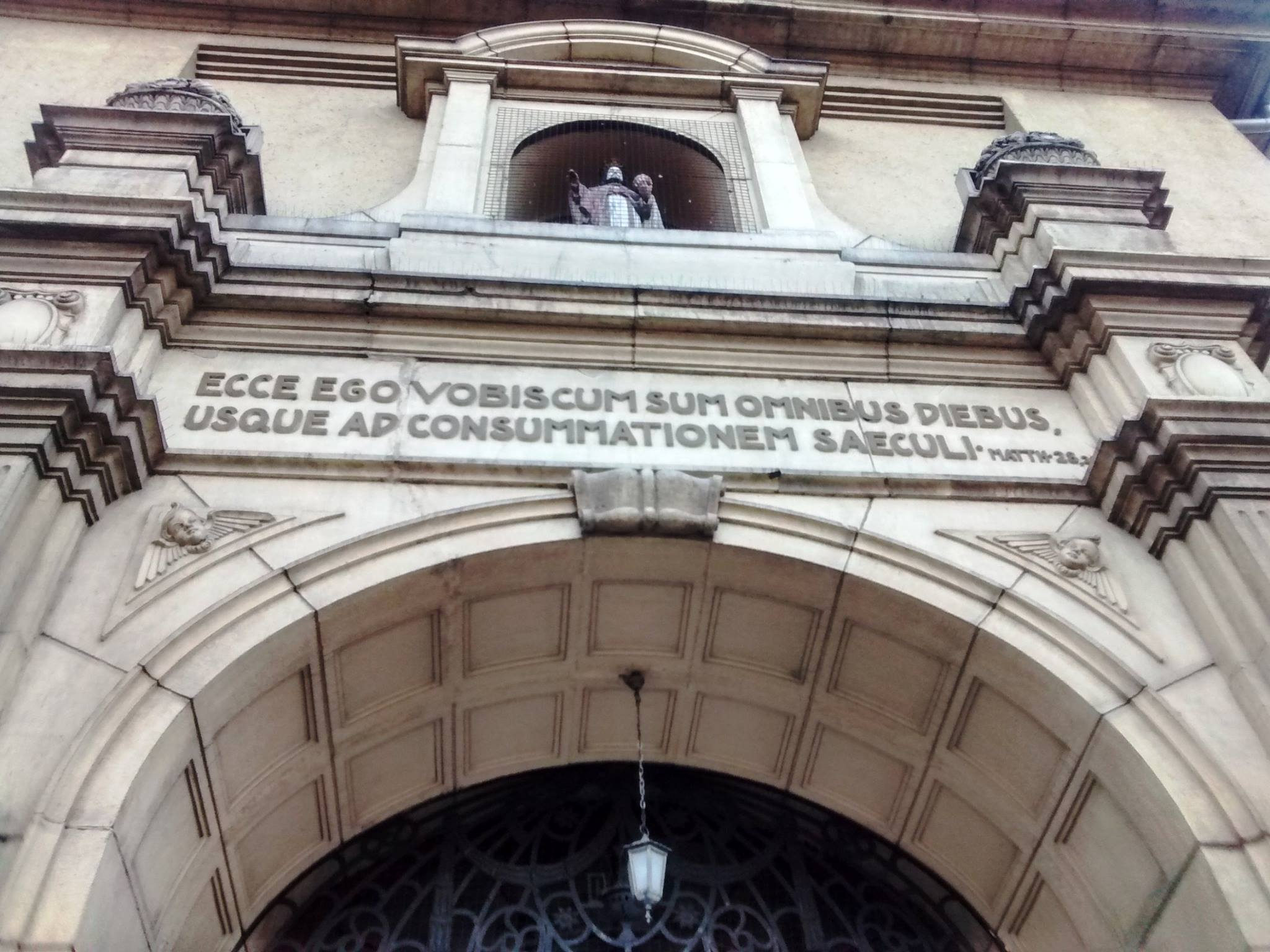 Napis nad wejściem do kościoła parafialnego pw. św. Antoniego z Padwy w Dąbrówce Małej, w Katowicach